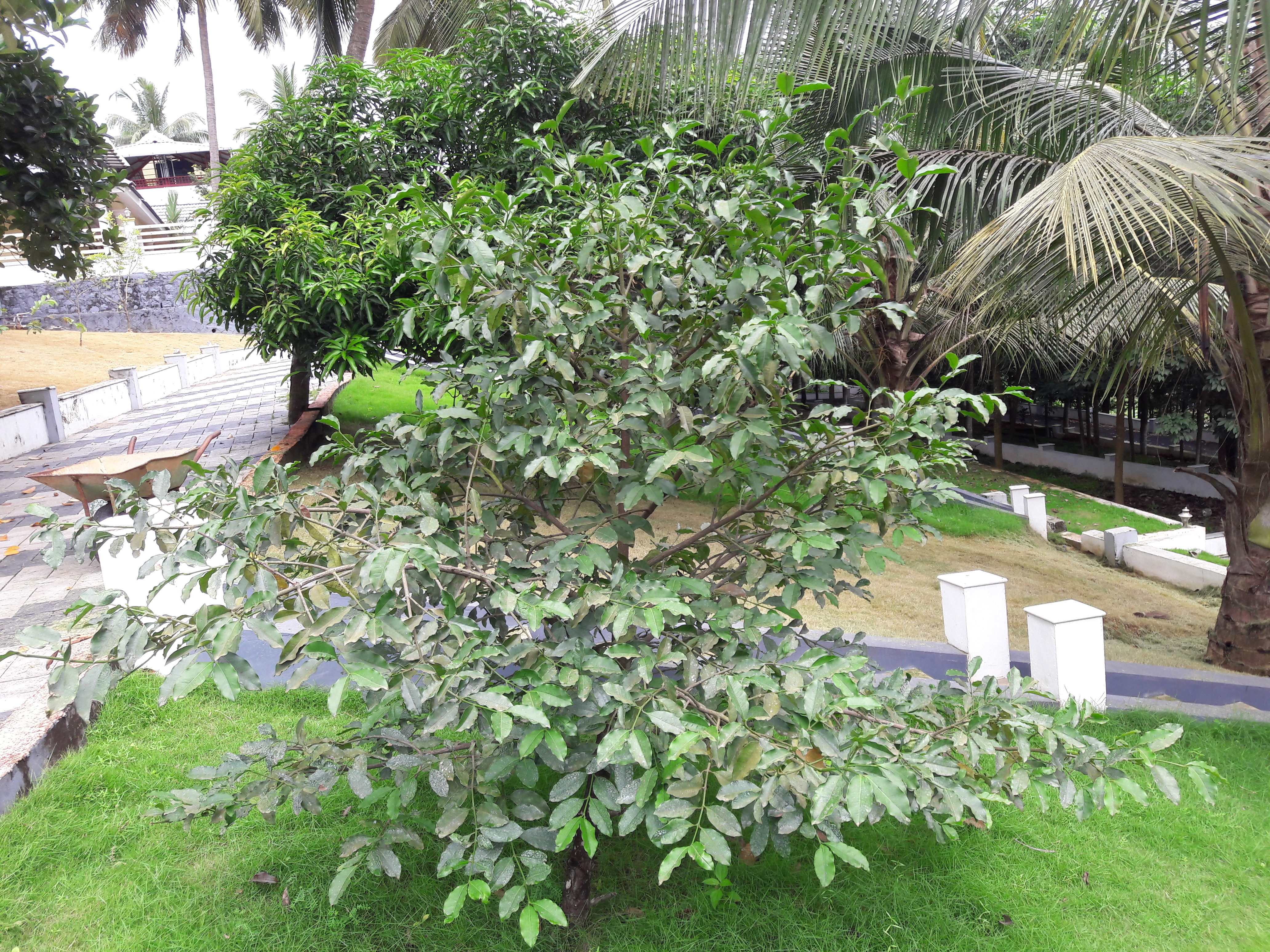 ബറാബ lemon drop mangosteen ശാസ്ത്രീയ നാമം Garcinia intermedia,കുടുംബം Clusiaceae